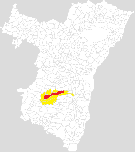 Communauté de communes du canton de Rosheim